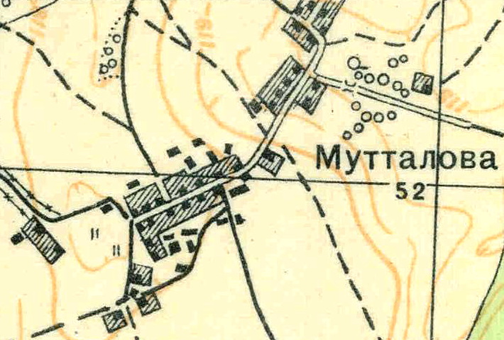 Топографическая карта Ленинградской области, квадрат О-35-24-Б-в (Вохоново), деревня Муттолово